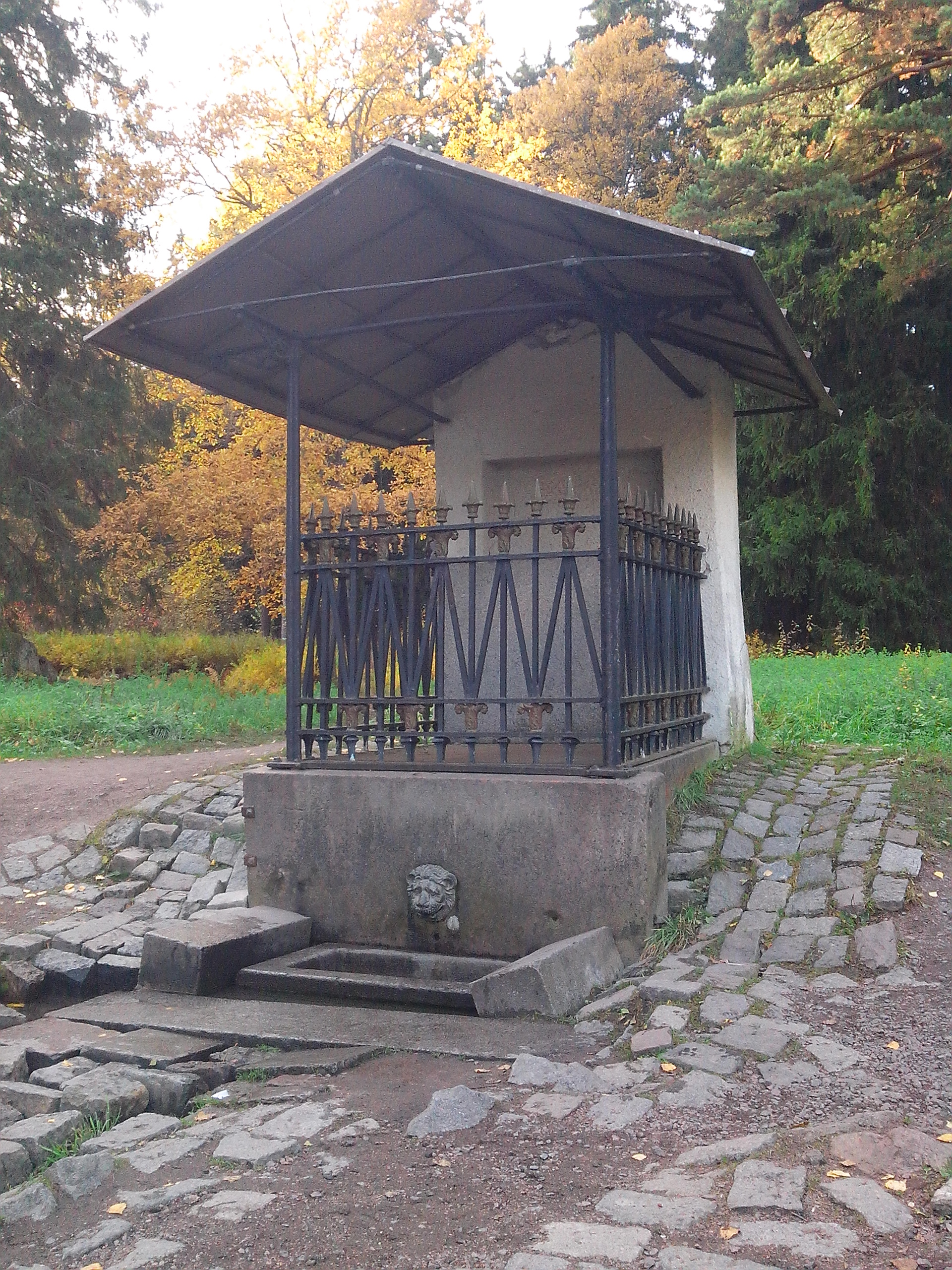 Источник Нарцисс в Парке Монрепо